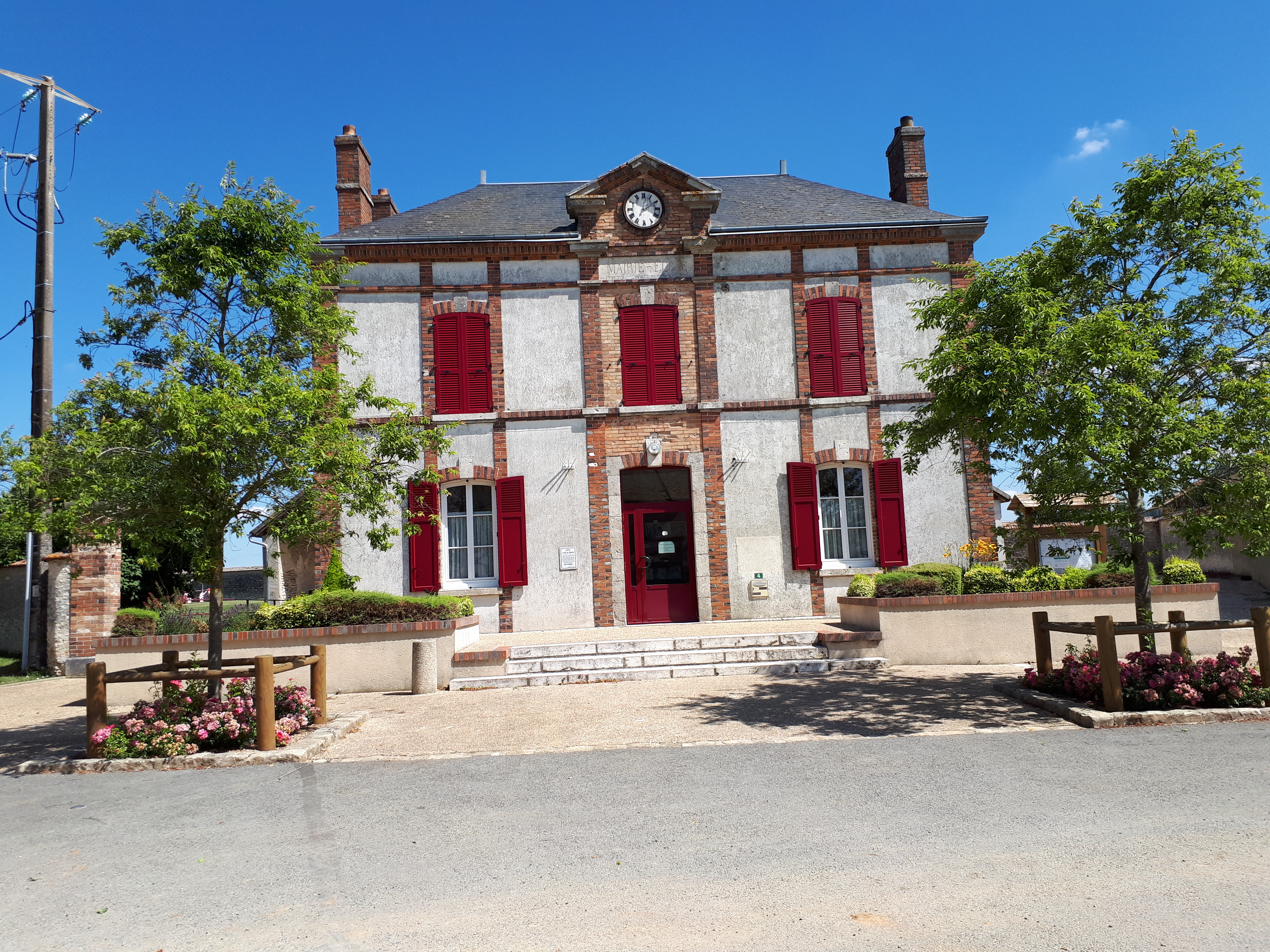 Mairie de Vierville (Eure-et-Loir).